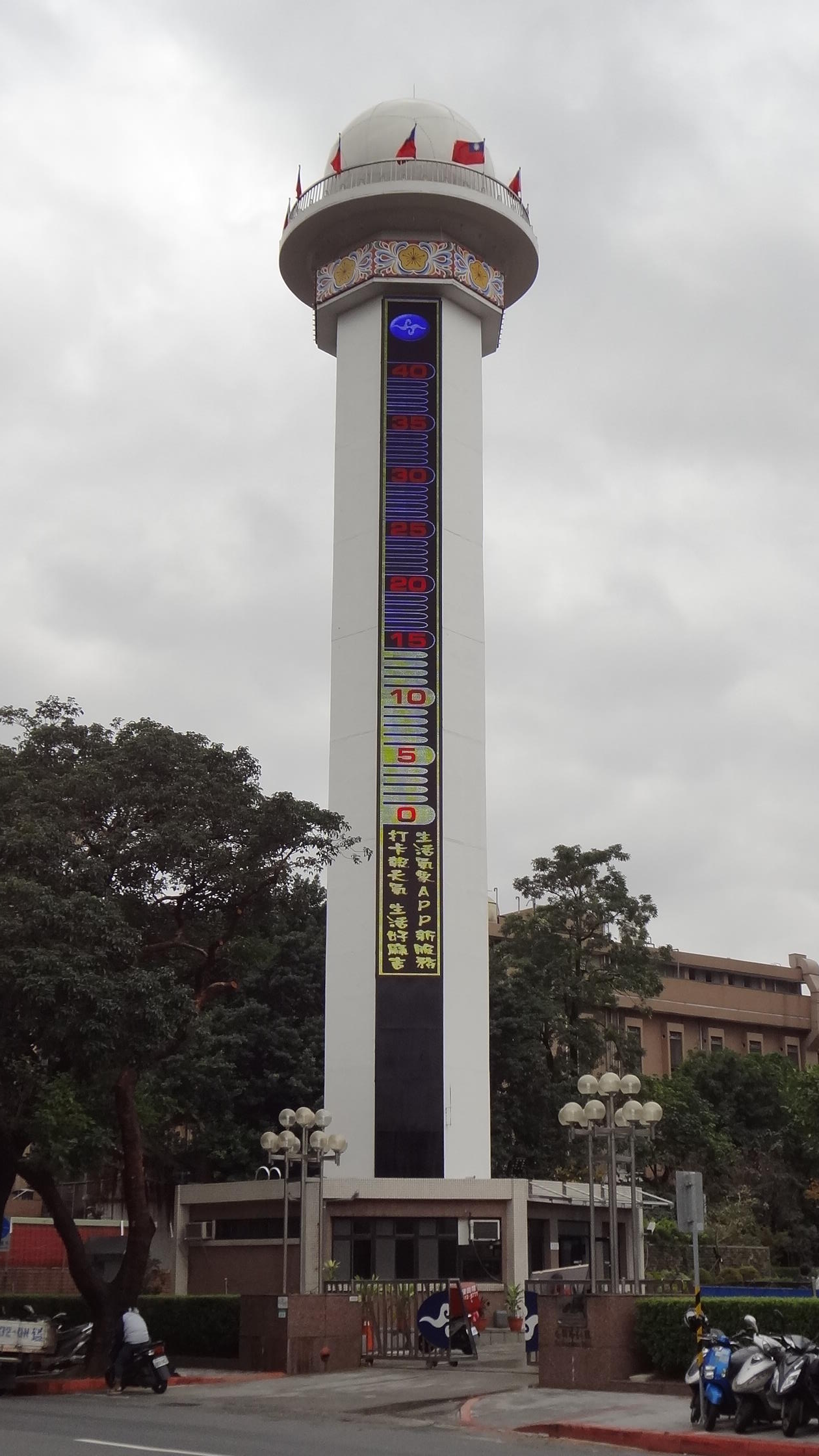 臺北市中正區公園路，中華民國交通部中央氣象局本部大門左側的LED溫度計。